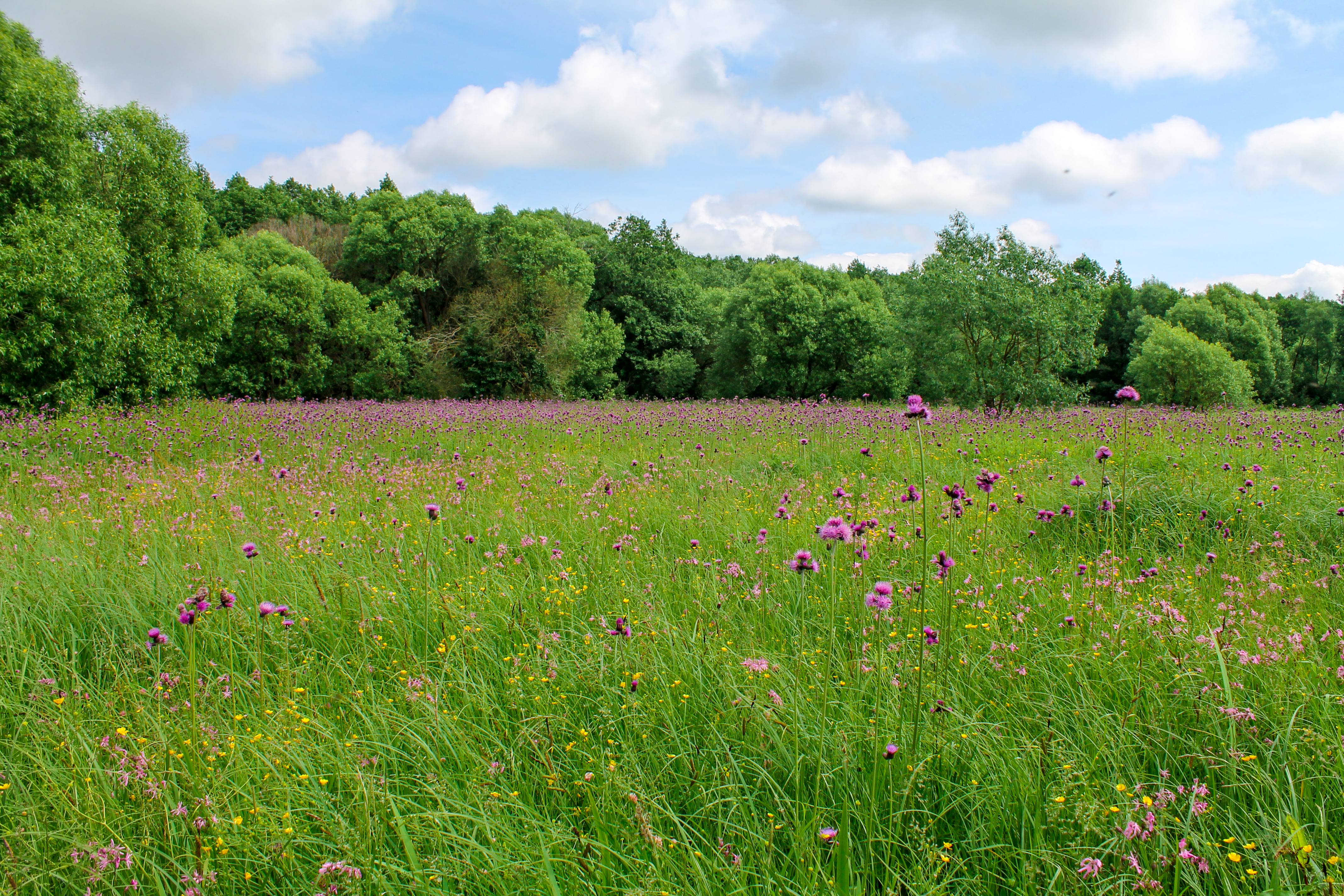 Бущанський, Острозький район кв. 29 вид. 1-7, 9-14, 16-28, 30-33; кв. 30 вид. 1-32